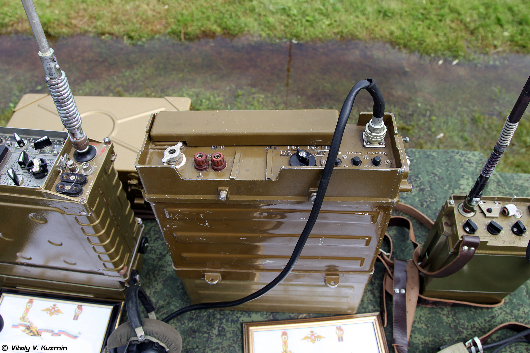 Радиостанция Р-159М (R-159M radio)